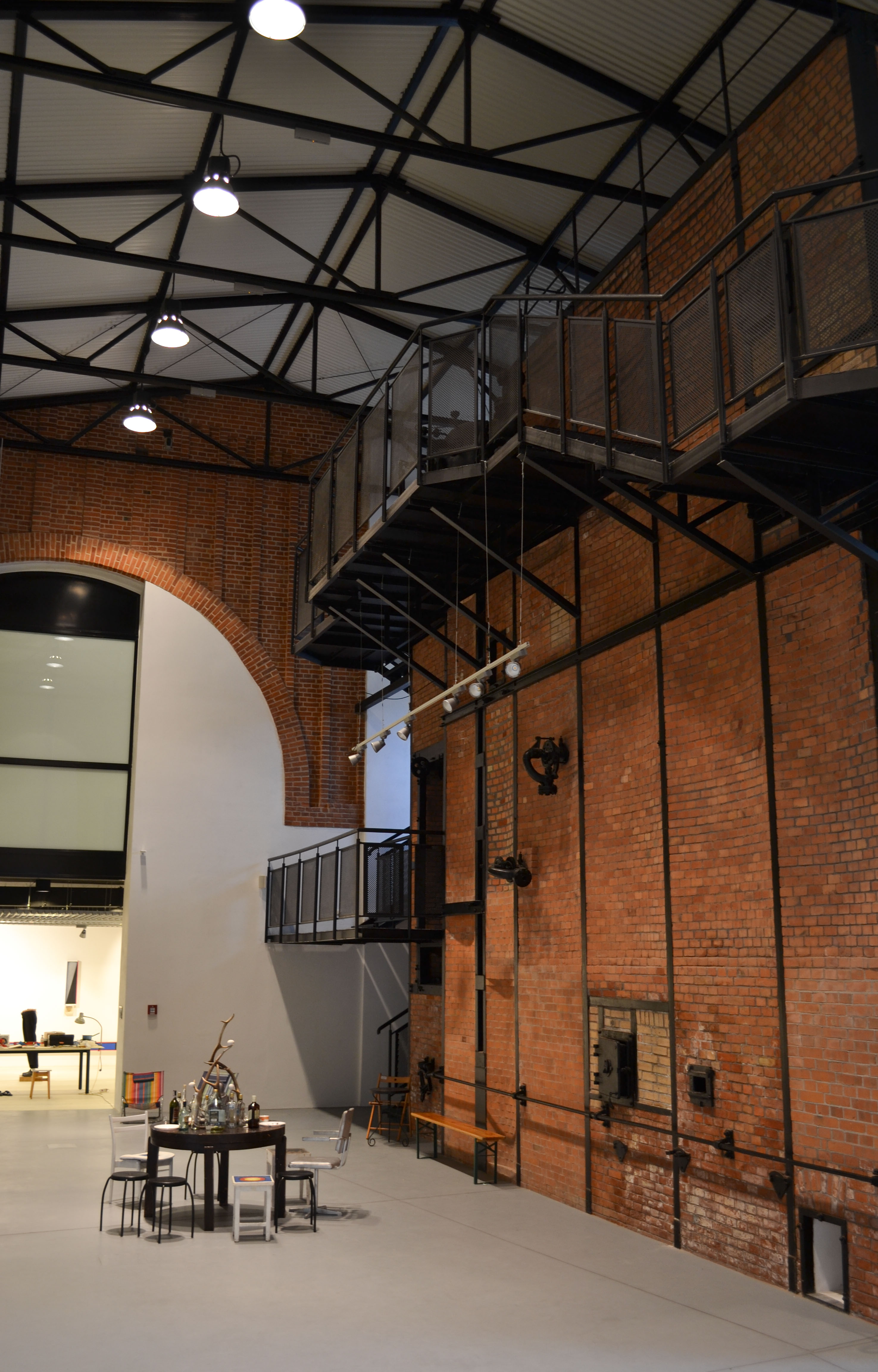 MCSW Elektrownia - sala ekspozycyjna z piecem